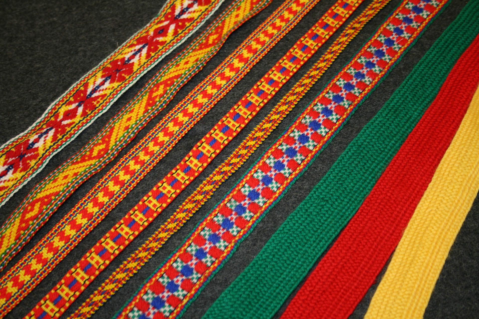 Davvisámegiella: Sámi vuoddagat ja báttit